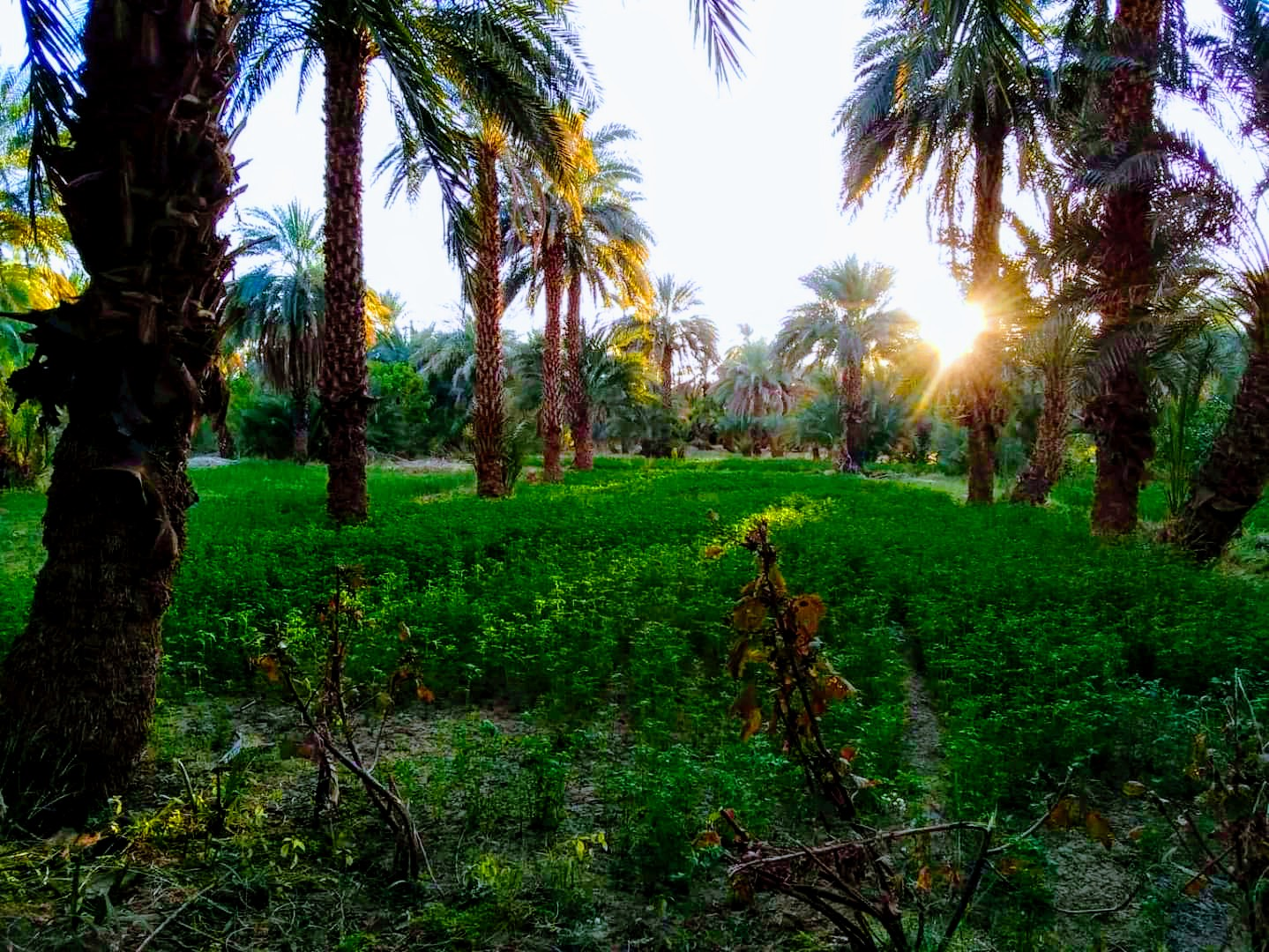 الدقاويت،نوري،مروي، الشمالية This is an image with the theme "Africa on the Move or Transport" from: Sudan